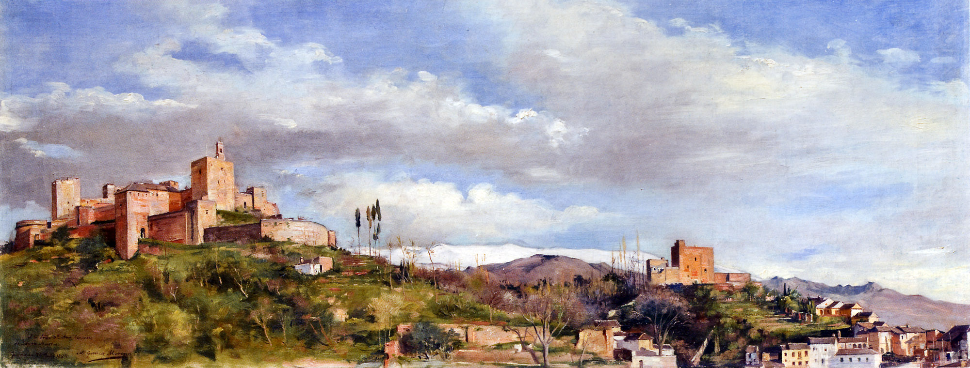 La obra representa la Alhambra de Granada y el castillo de Torres Bermejas.